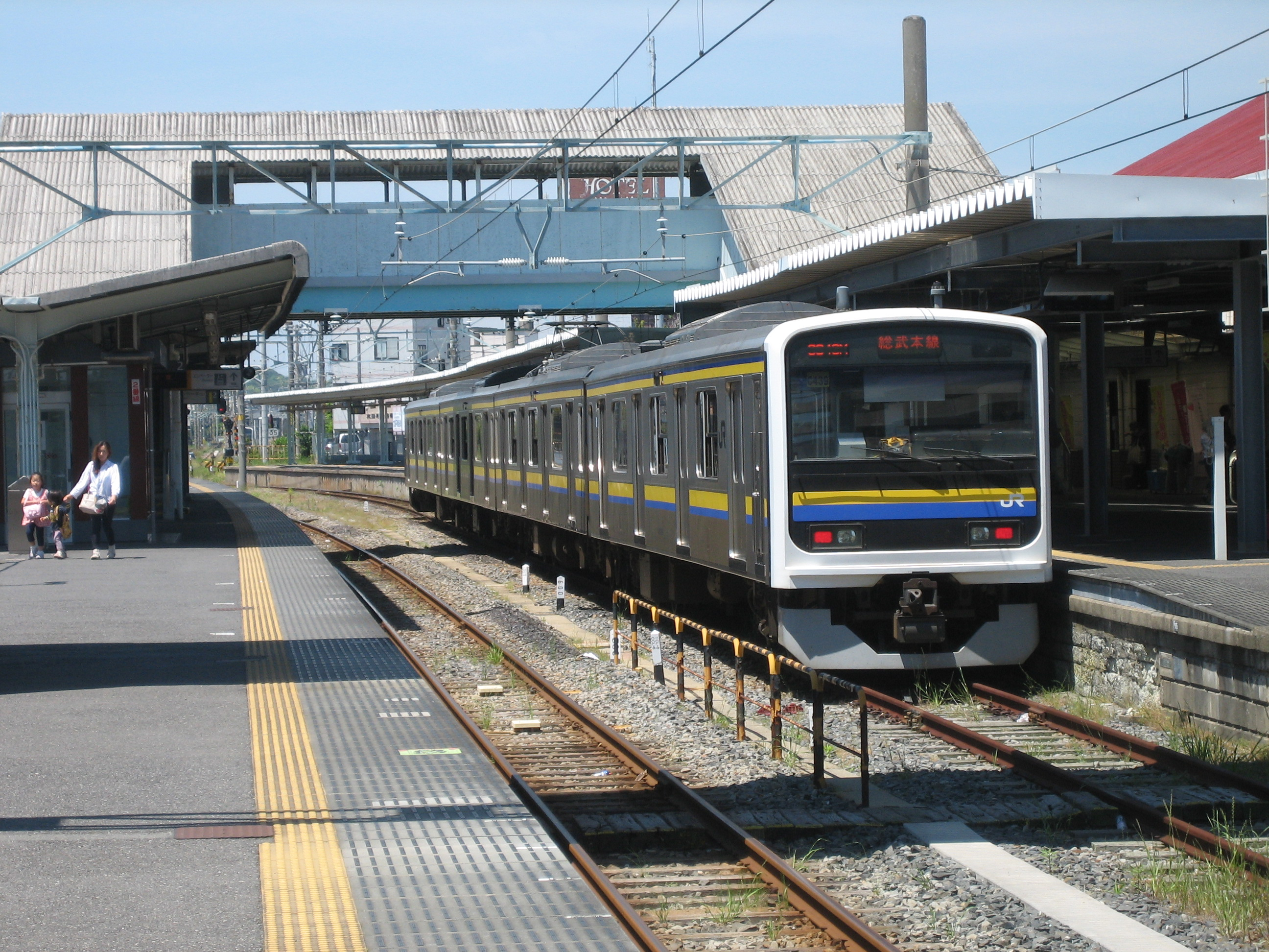 銚子駅に停車中の209系2100番台